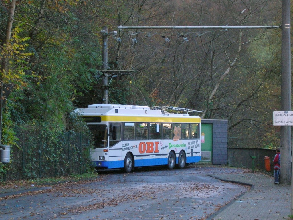 Obus-Drehscheibe in Solingen-Burg in Betrieb 3/4